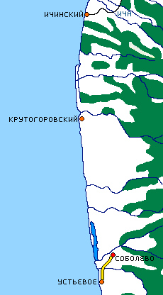 Соболевский район (населенные пункты)